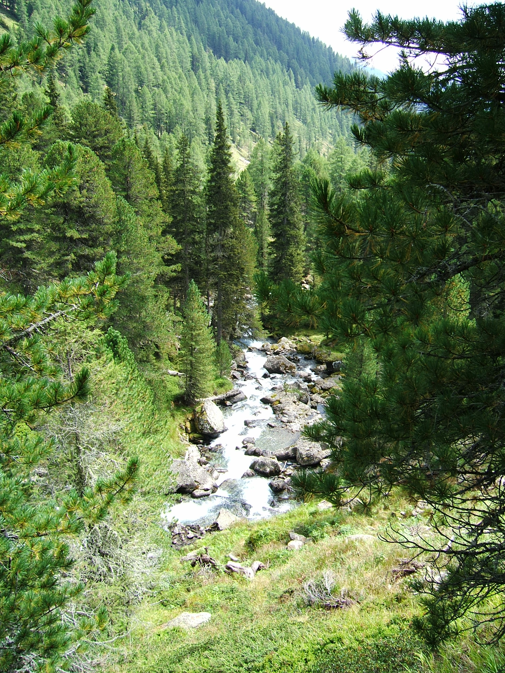 Debantbach zwischen Seichenbrunn und Hofalm